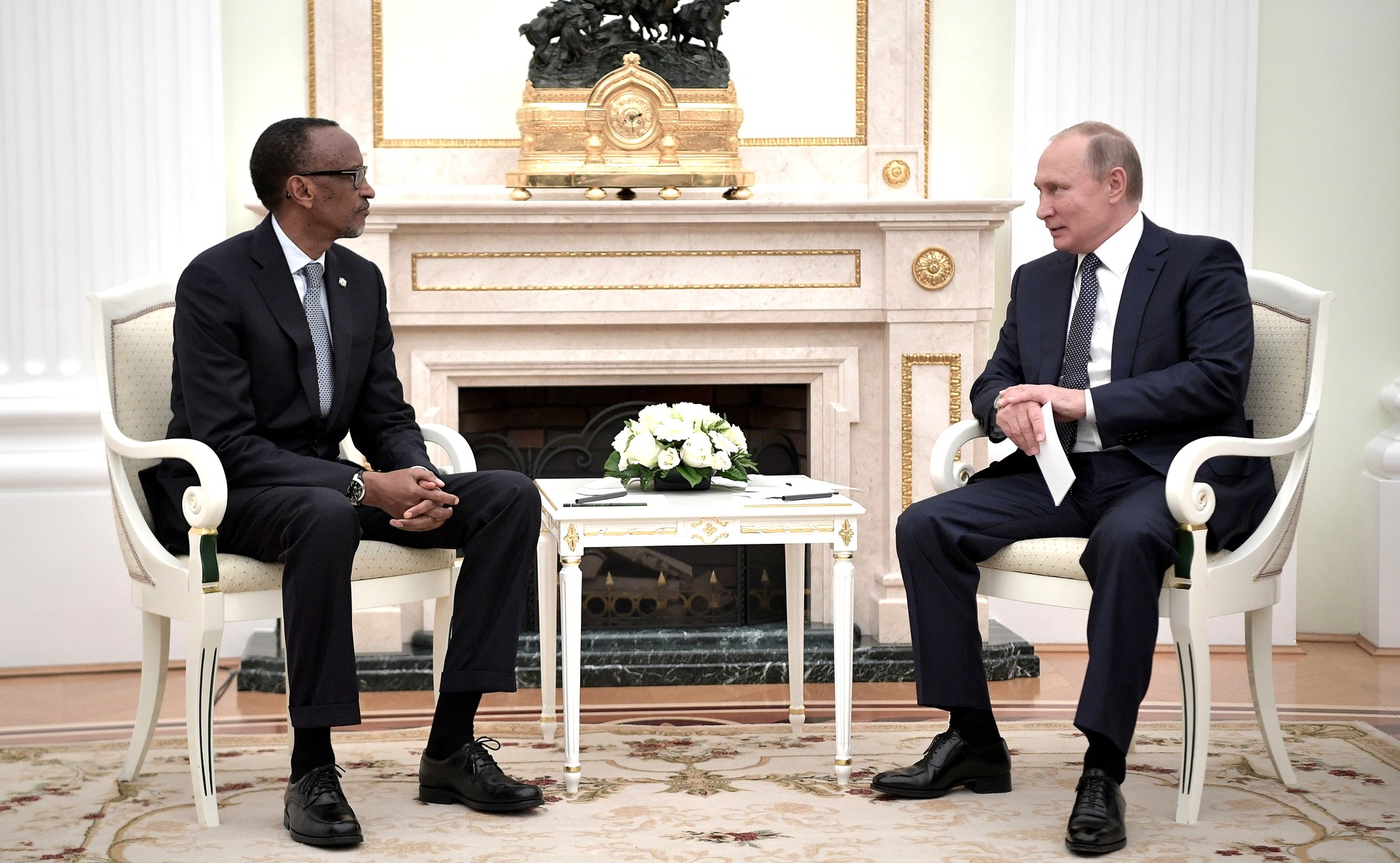 Встреча Президента России Владимира Путина с Президентом Республики Руанда Полем Кагаме